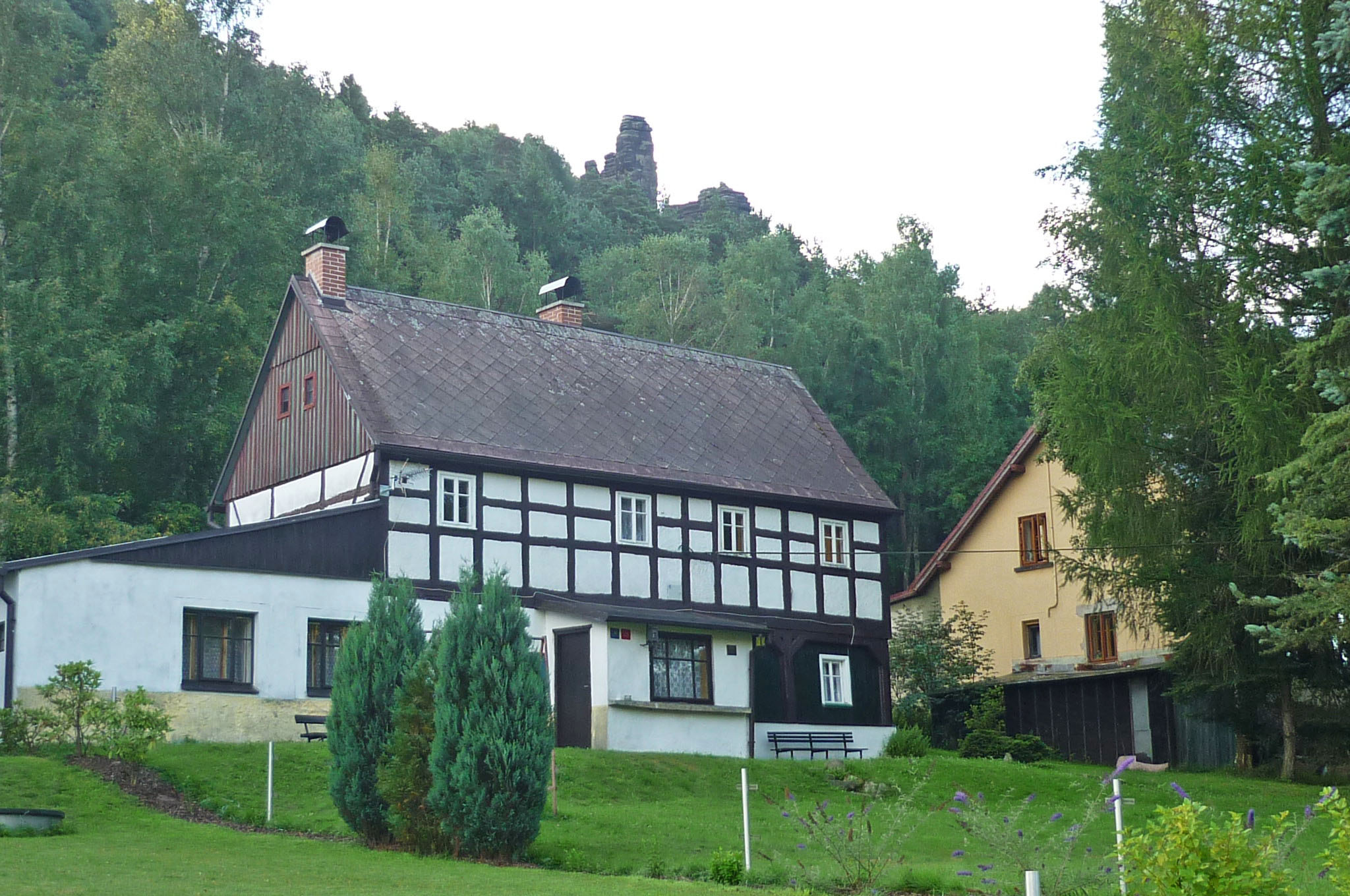 Kaiserturm oberhalb von Eiland/Ostrov im Elbsandsteingebirge